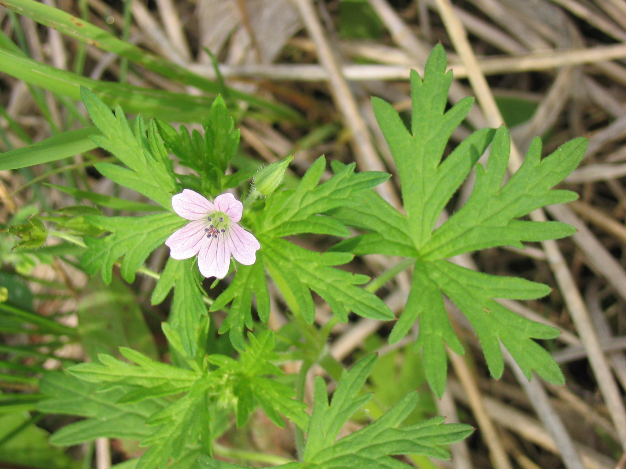 Geranium_bicknellii_6-eheep